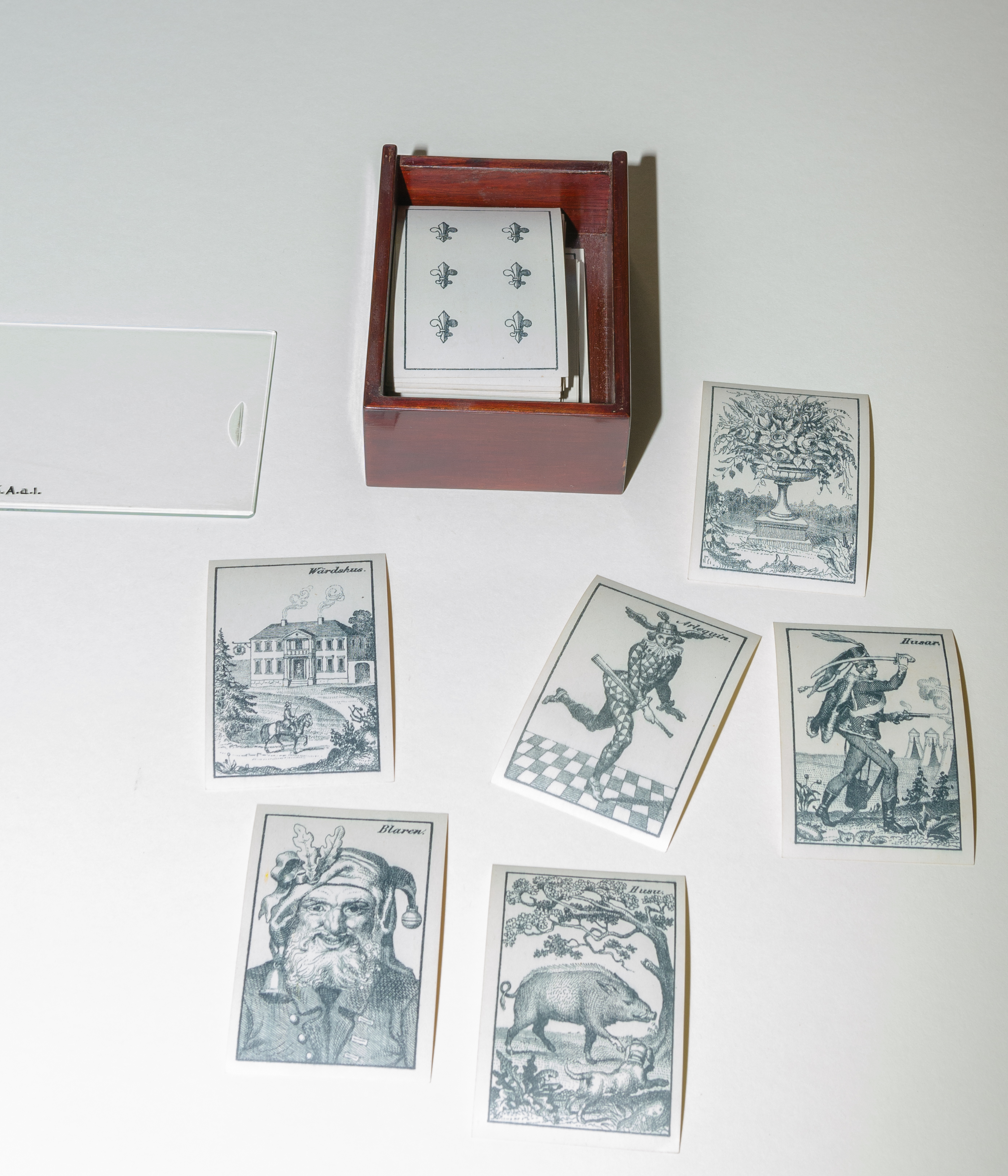 Kortlek för Kille. Hallwylska museet. Tillverkad i Norrköping 1897. Föremålsgrupp: 15. XV Spel. Inventarienummmer: 12641 XV:K.A.a.02.